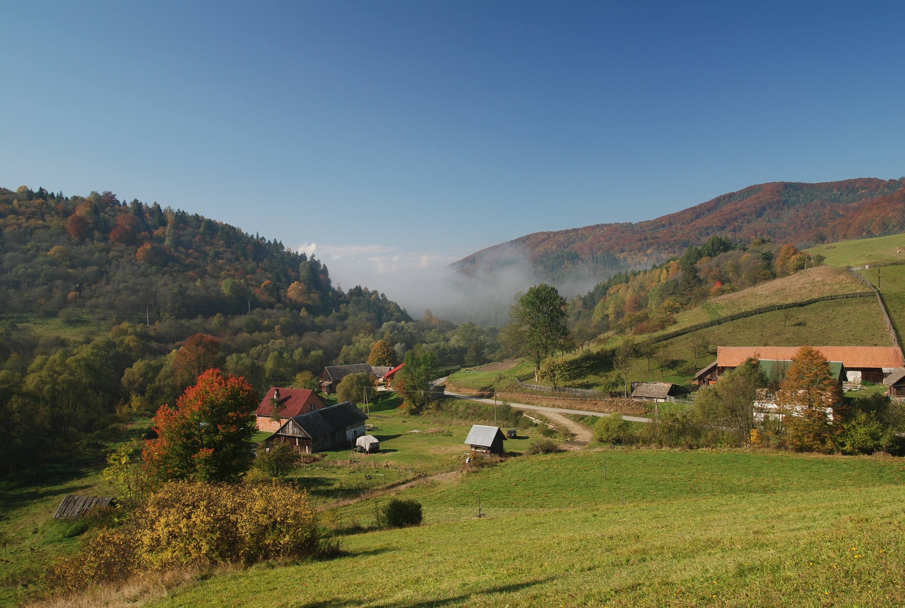 wieś Dubne